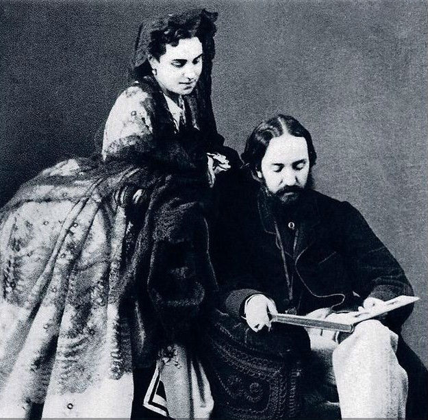 Граф Григорий Александрович Кушелев-Безбородко с женой